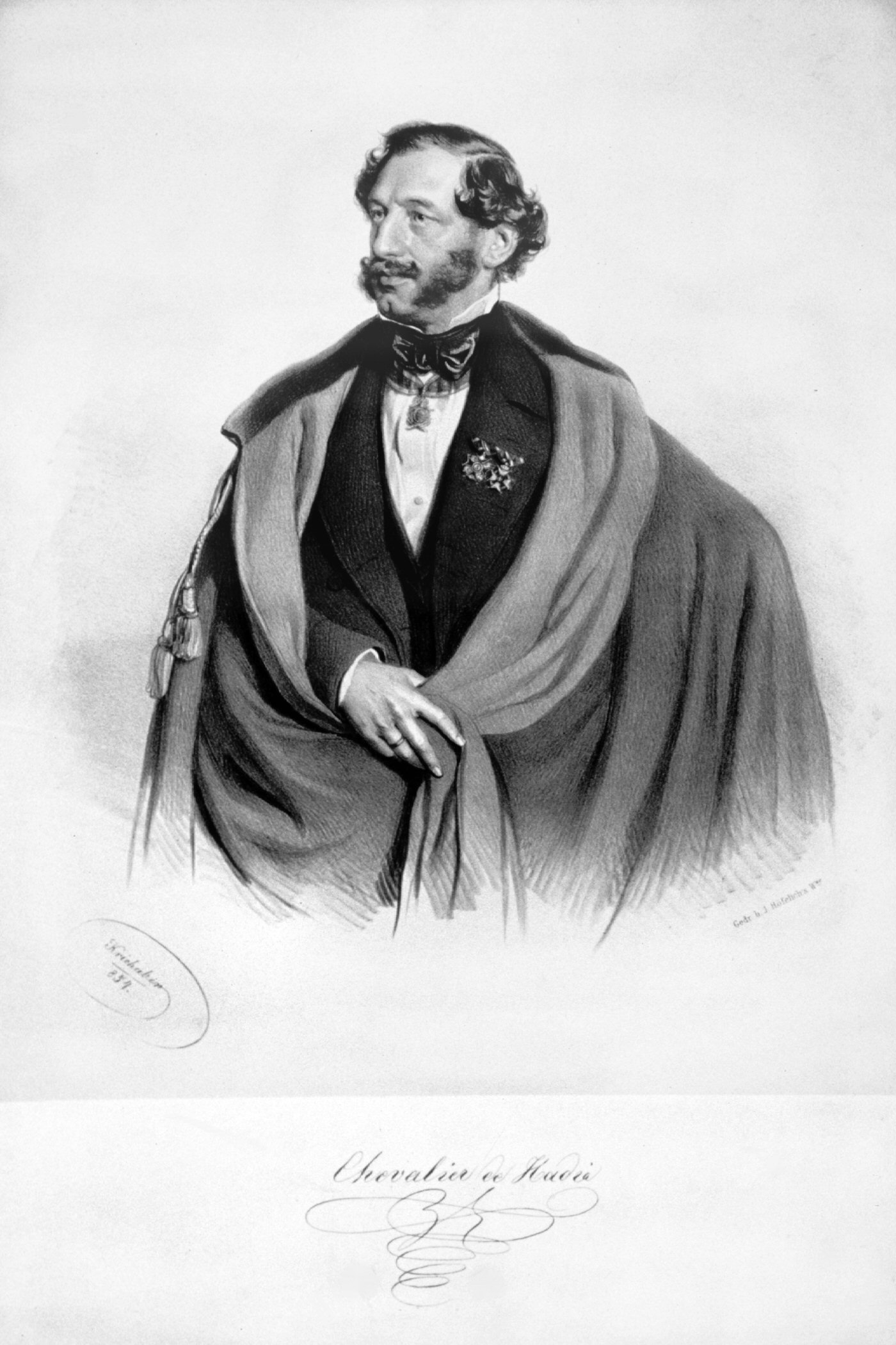 Konstantin Hadia, Sekretär des Fürsten Milosch Obrenovic von Serbien (1780-1860). Lithographie von Josef Kriehuber, 1854